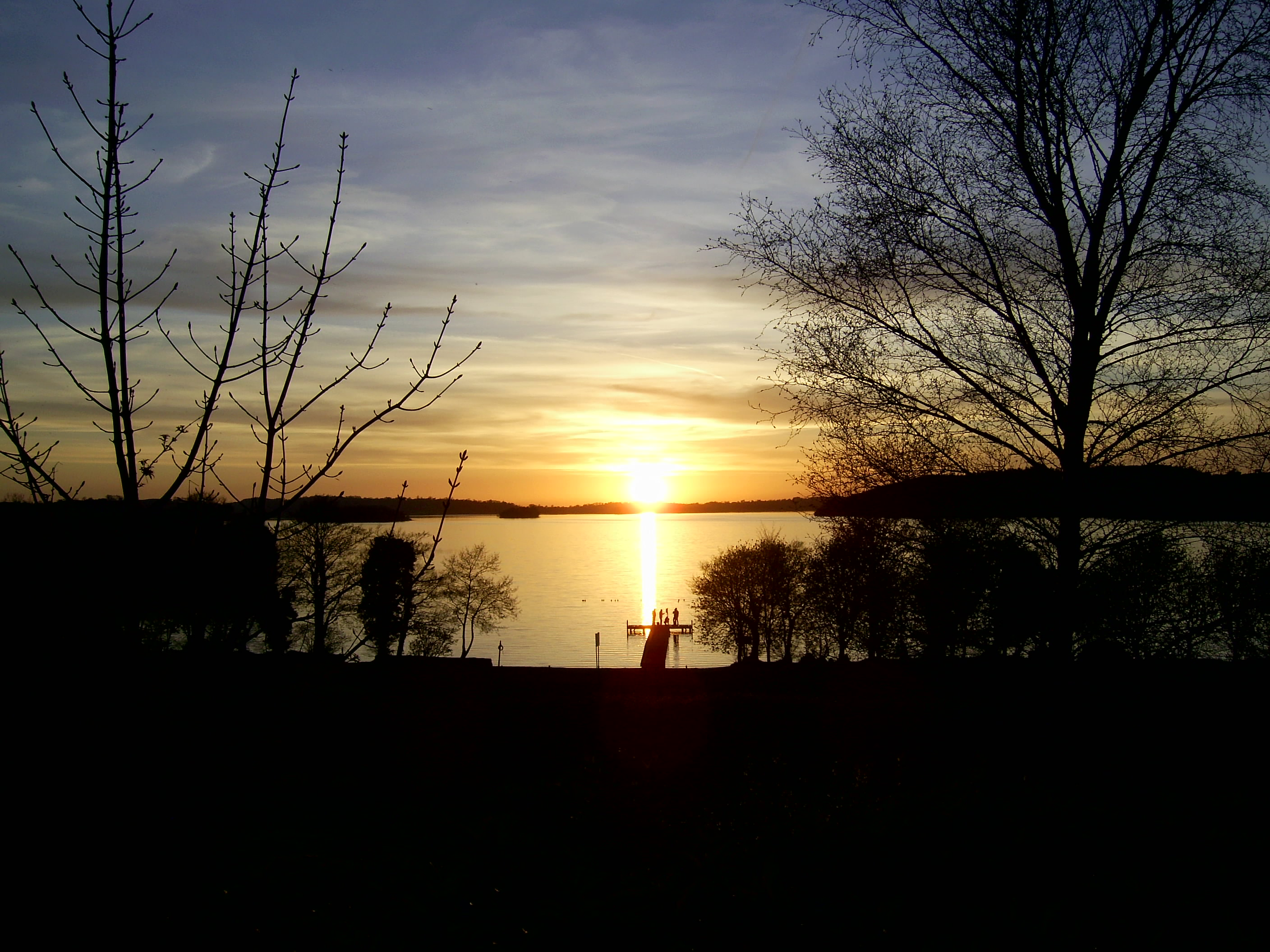 Couché de Soleil Lough Lene.jpg